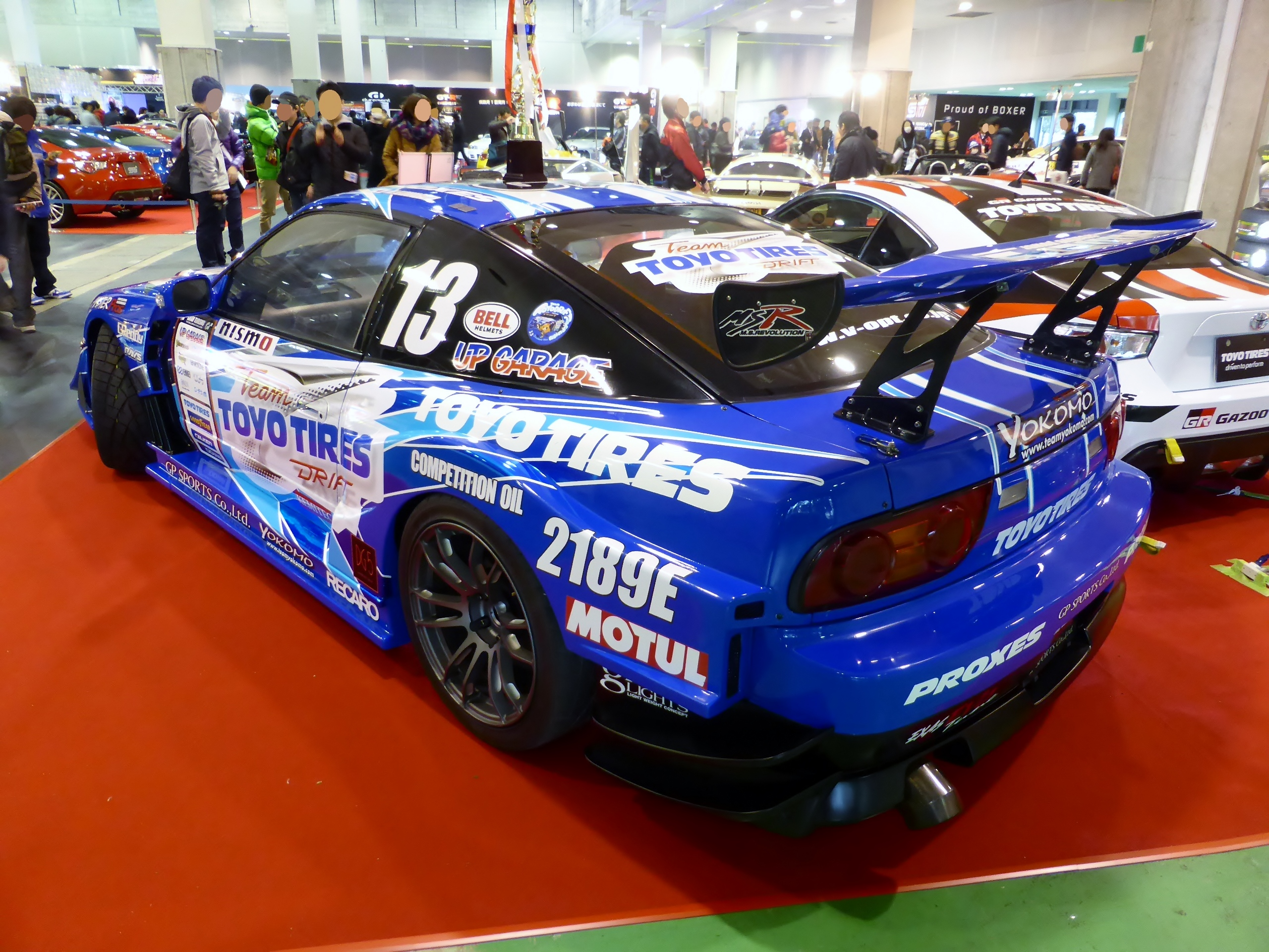 大阪オートメッセ2014においてTEAM TOYO with GP SPORTS 180SXを撮影。